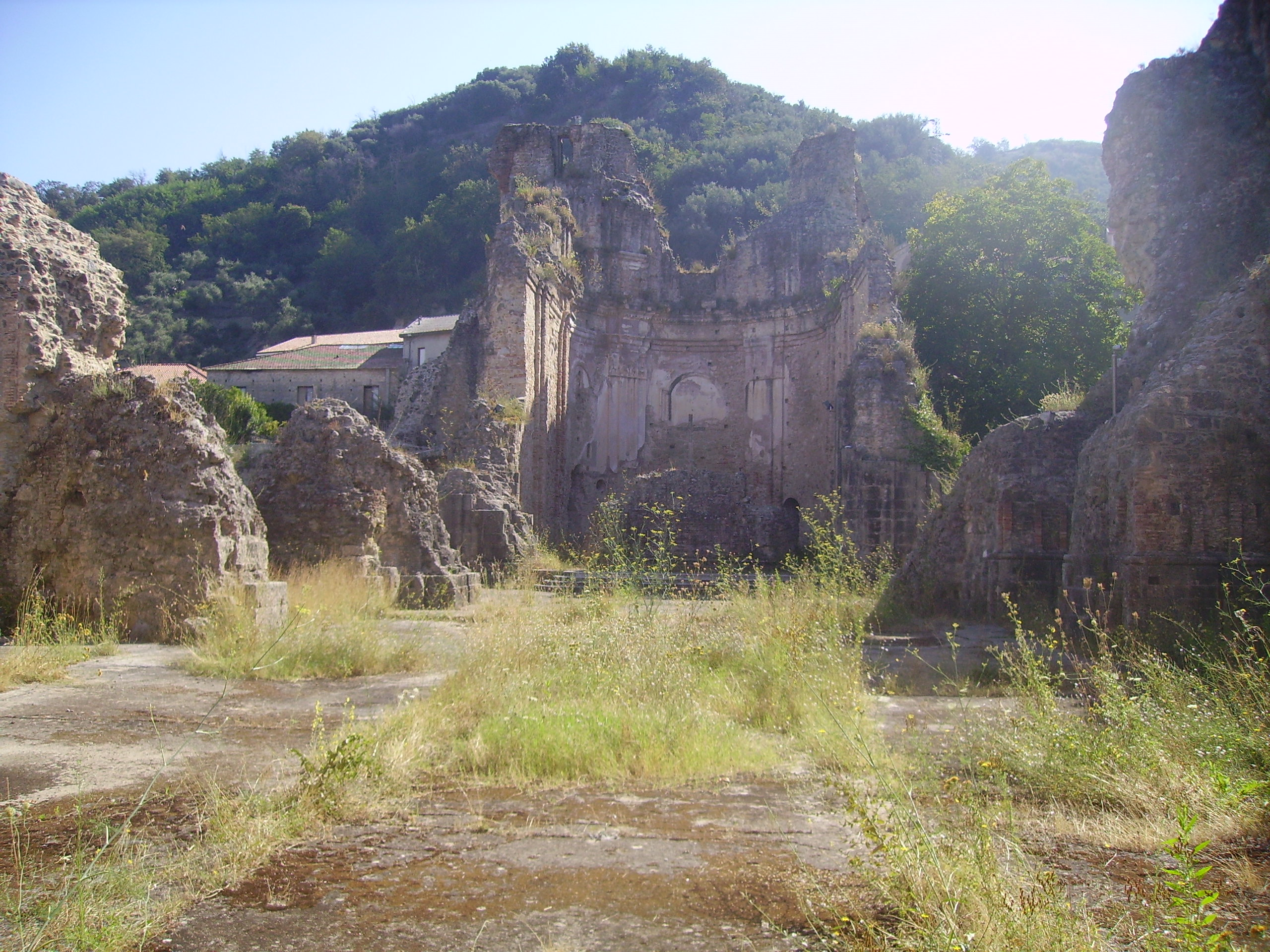 L'interno della crollata chiesa di San Domenico a Soriano Calabro (CS), Italia, distrutta dal terremoto del 1783.